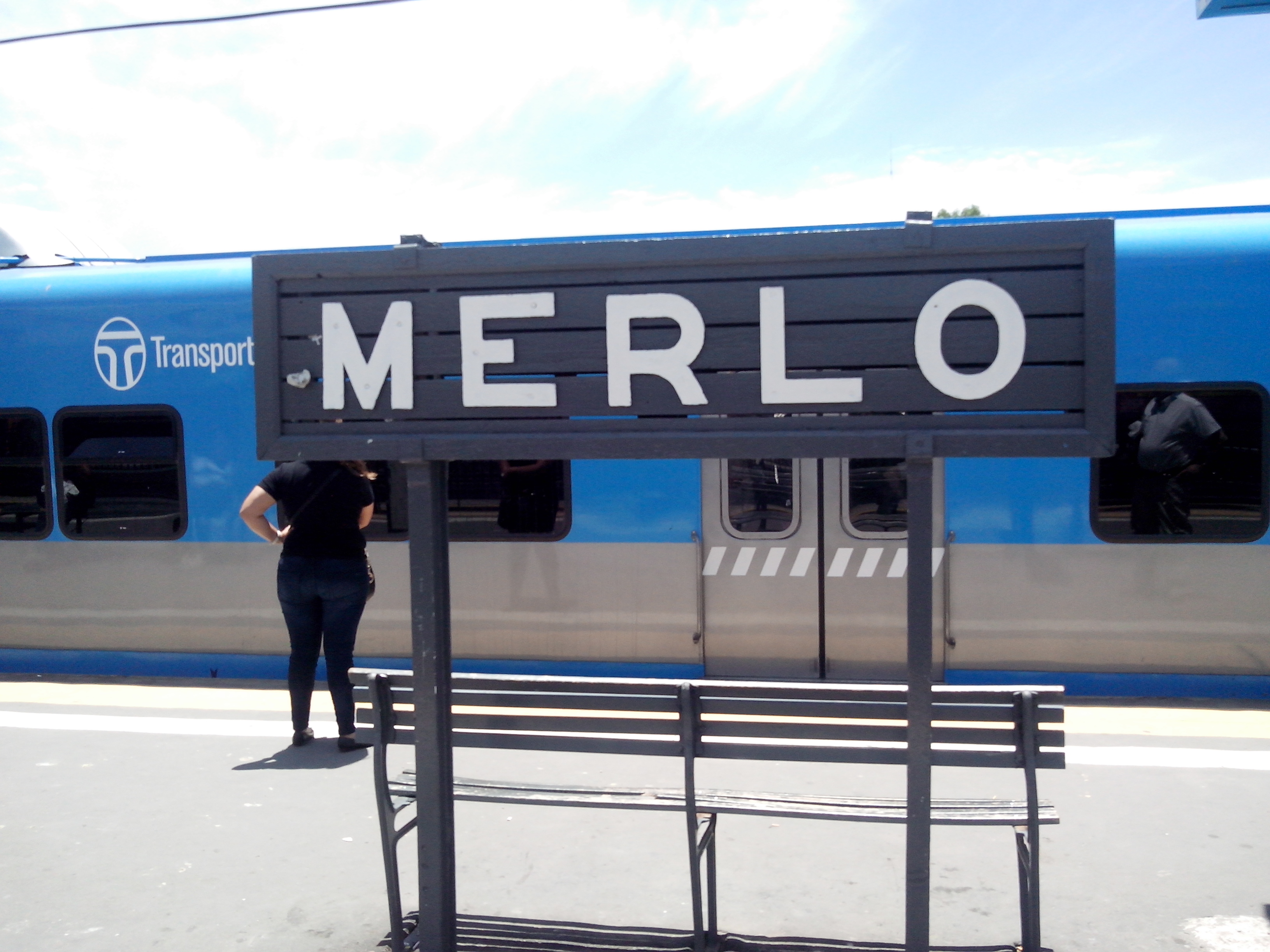 cartel de estación merlo